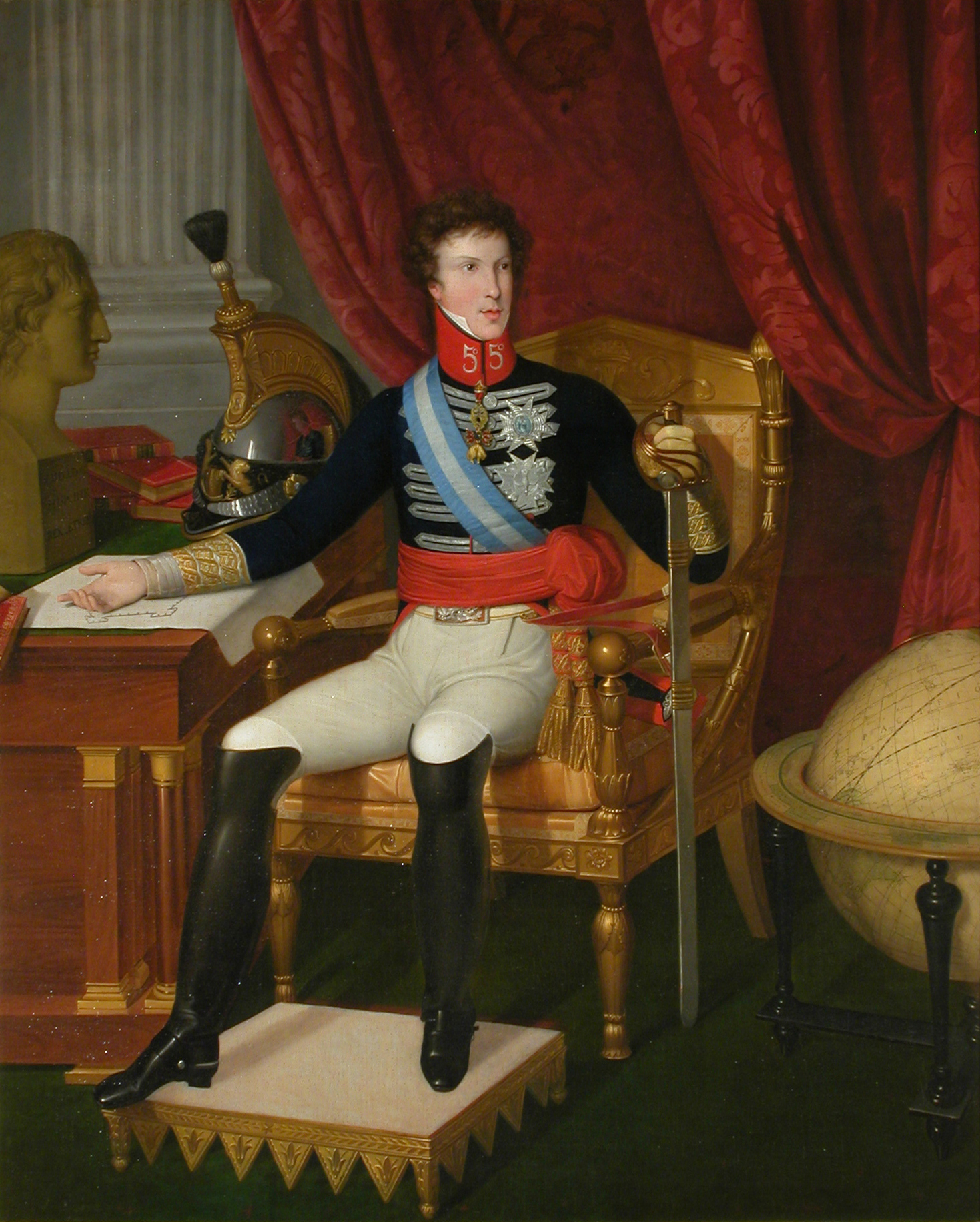 Carlo Ludovico di Borbone (1799-1883), duca di Lucca dal 1824 al 1847